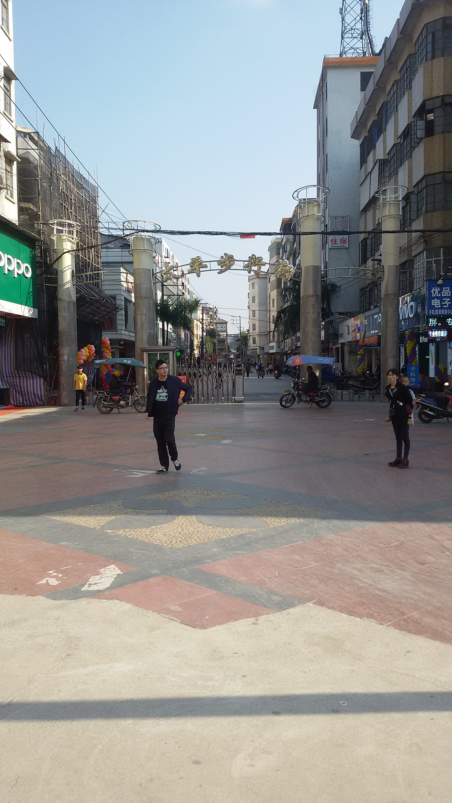 粵語: 太平步行街